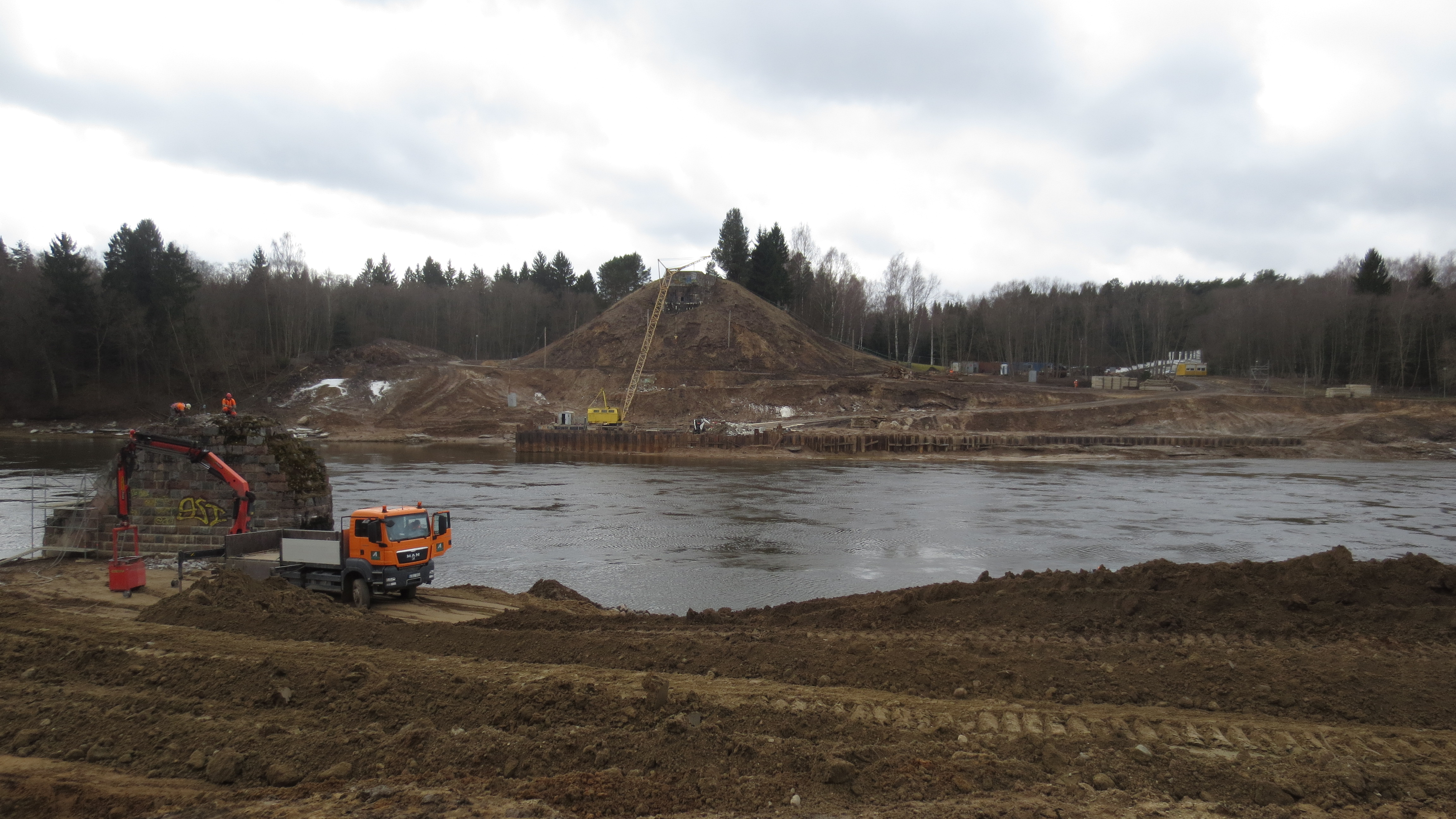 Paruošiamieji tilto statybos darbai